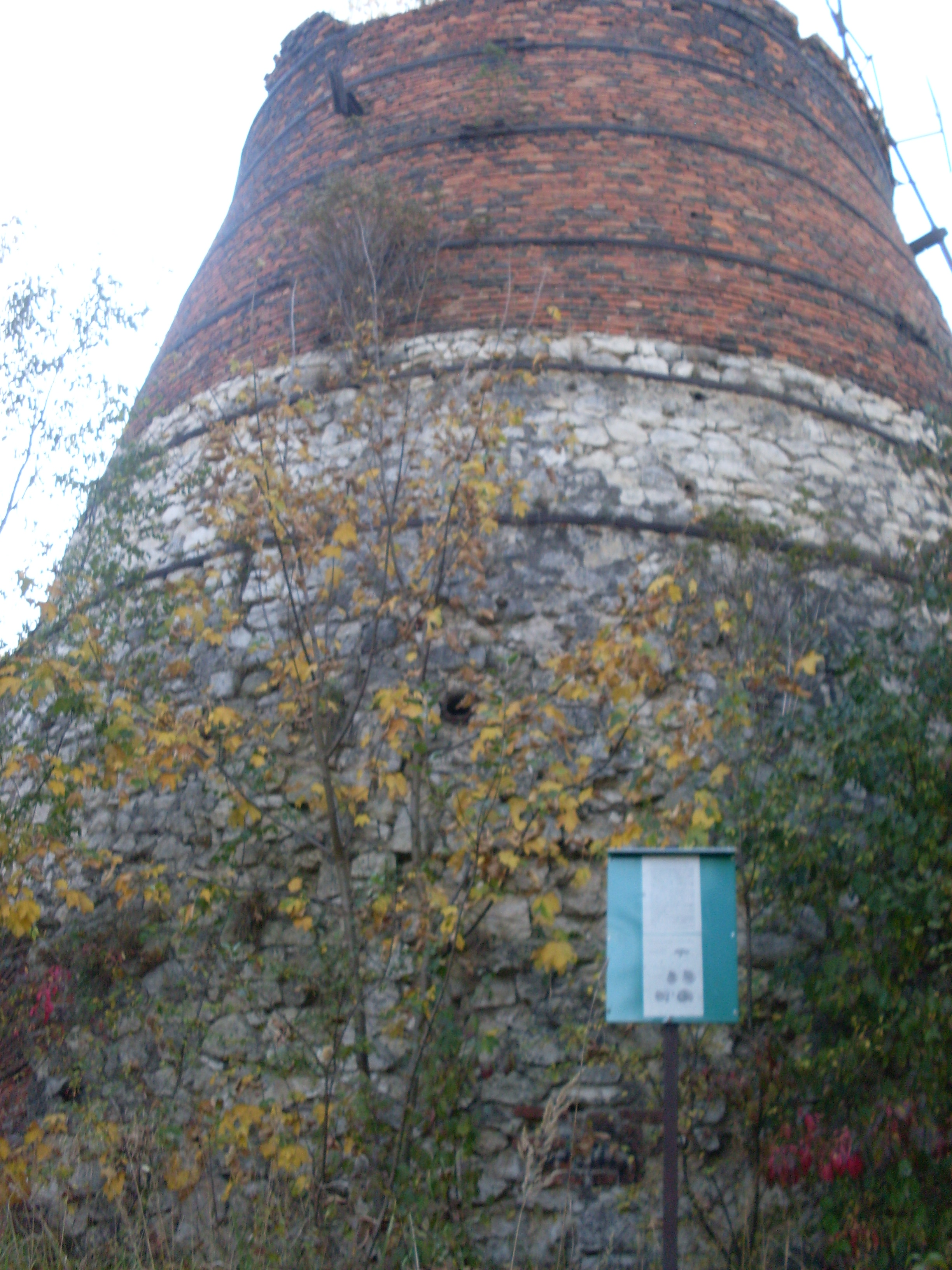 Krzeszowice.Gwoździec.Stara Sztolnia Dawny wapiennik